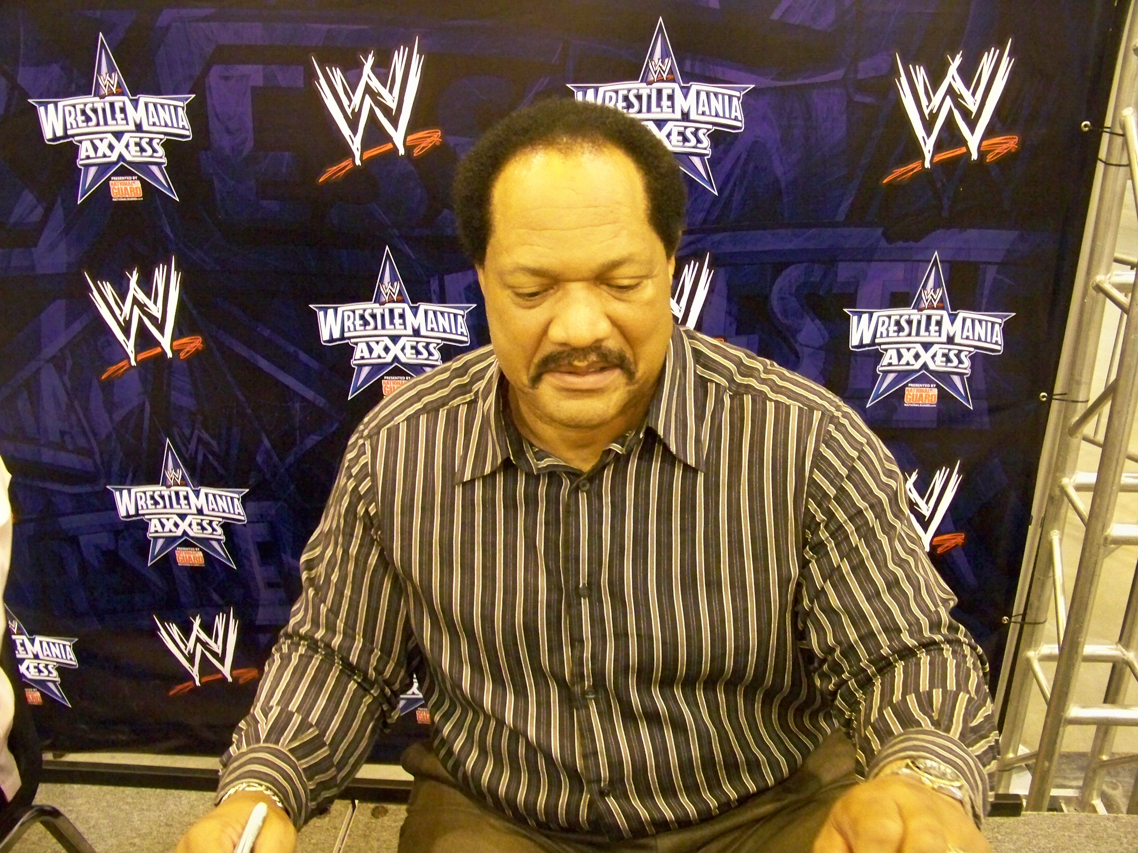 DAMN